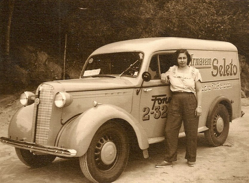 Vauxhall Bedford PC Van, fabricado na Inglaterra e importado para o Brasil em 1950